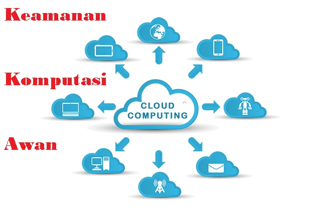 Keamanan komputasi awan